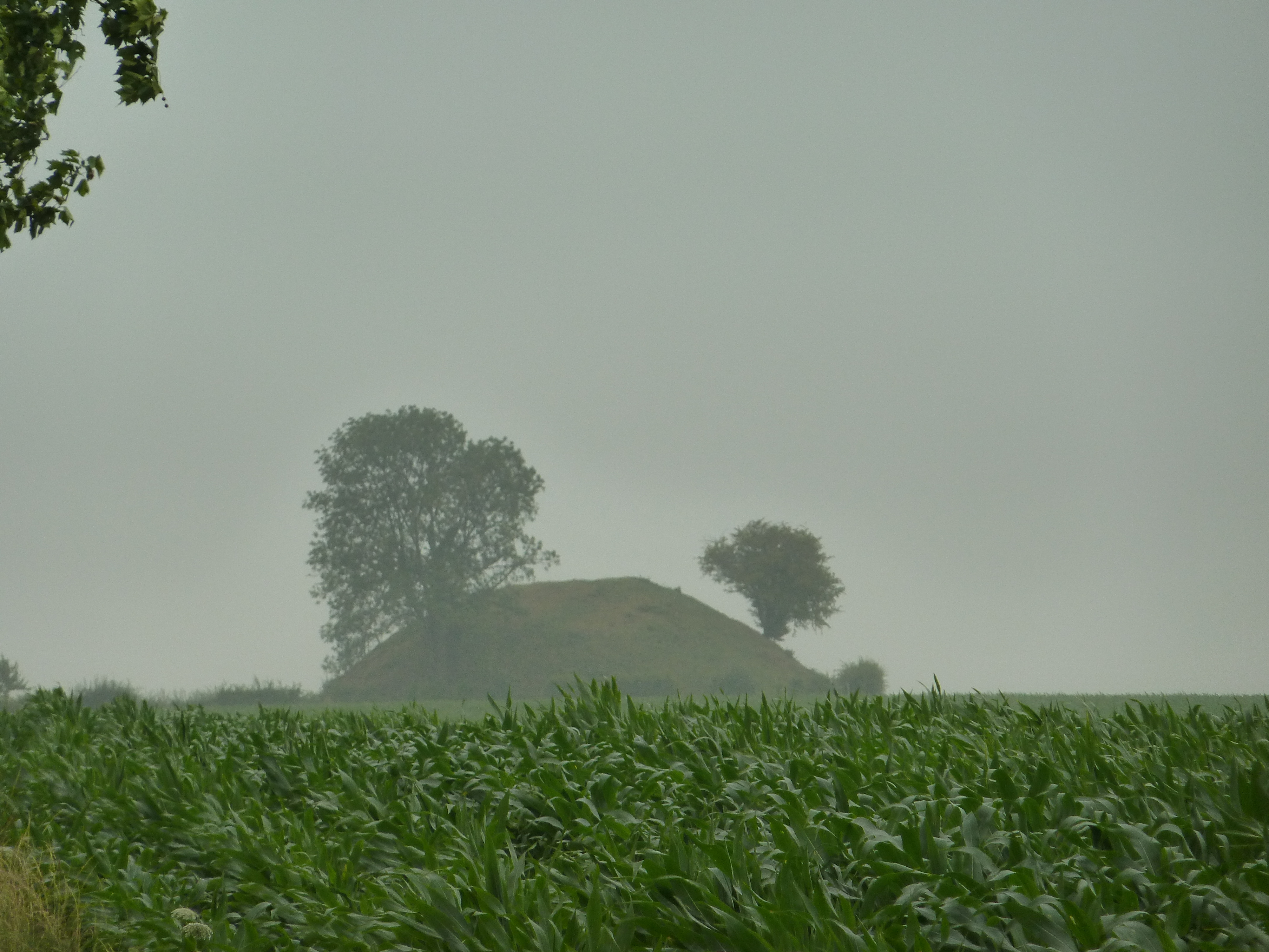 Tumulus d'Herstappe, Lauw, Tongeren, Belgique